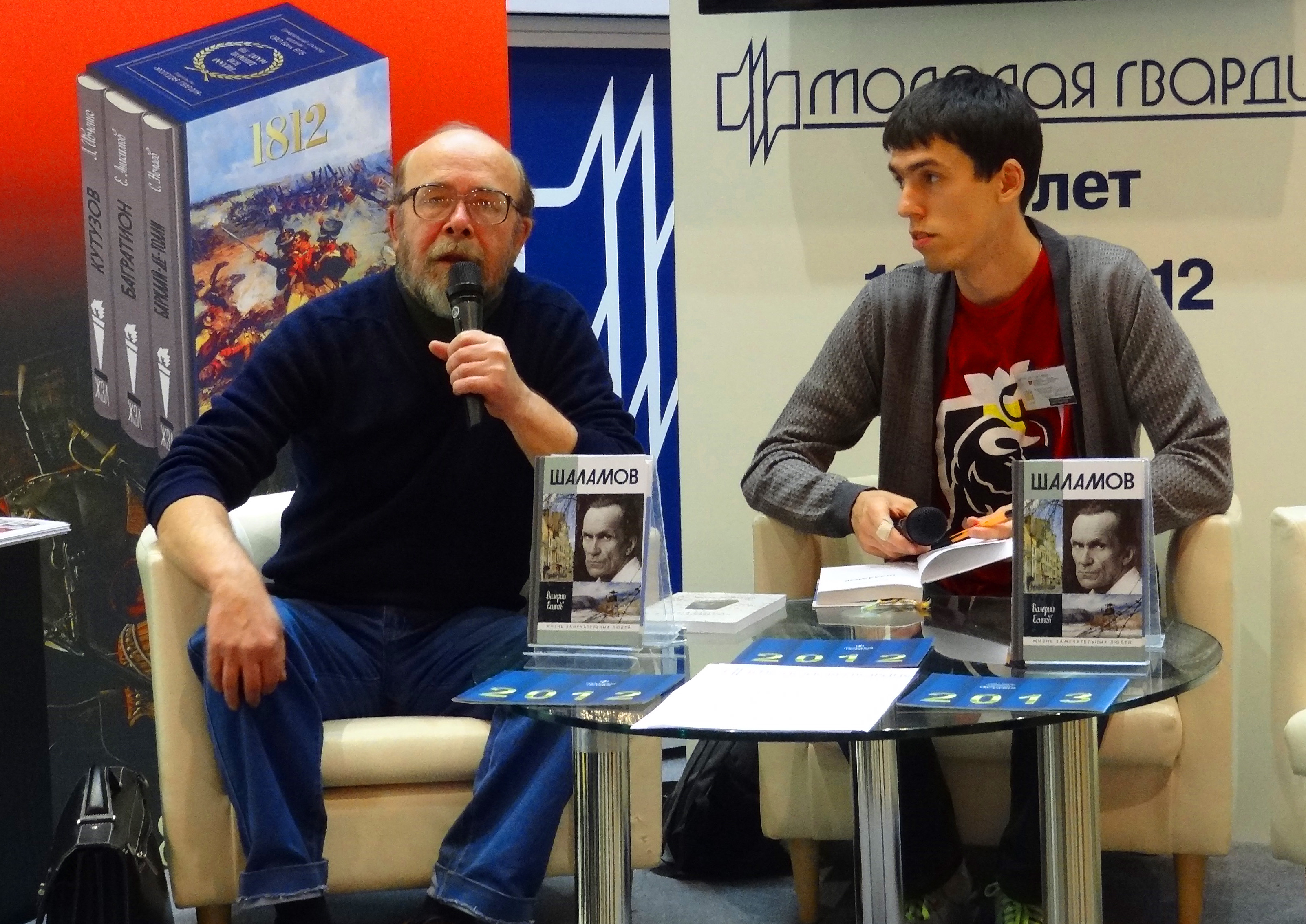 Валерий Васильевич Есипов (на фото слева) — российский писатель, журналист на презентации своей книги «Шаламов» в серии ЖЗЛ на 25-й Московской международной выставке ярмарке. Москва, 2012 год.